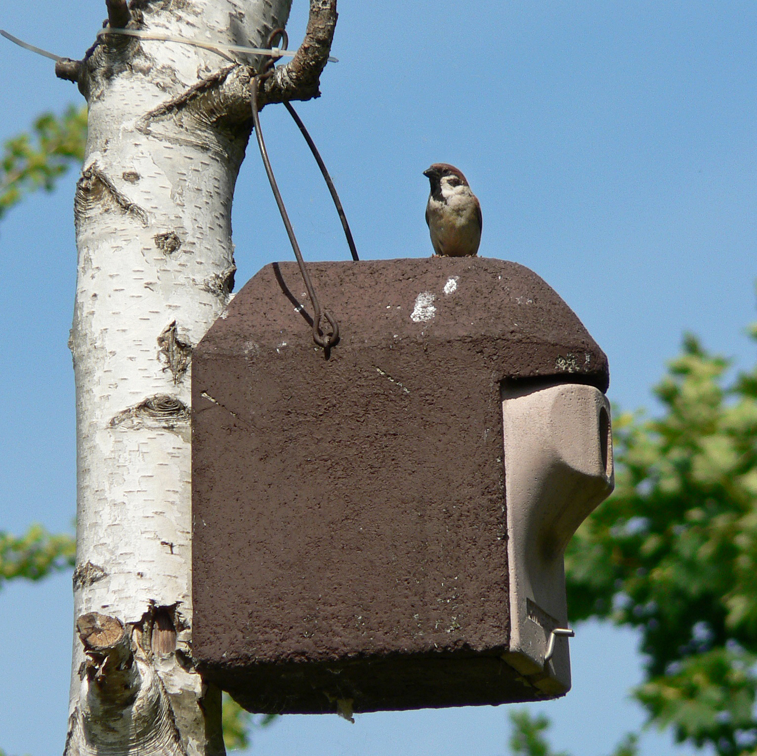 Beschreibung: Feldsperling (Passer montanus) Ort: Bad Soden, Hessen, Germany Fotograf: Olaf Mertens, 26.05.2005